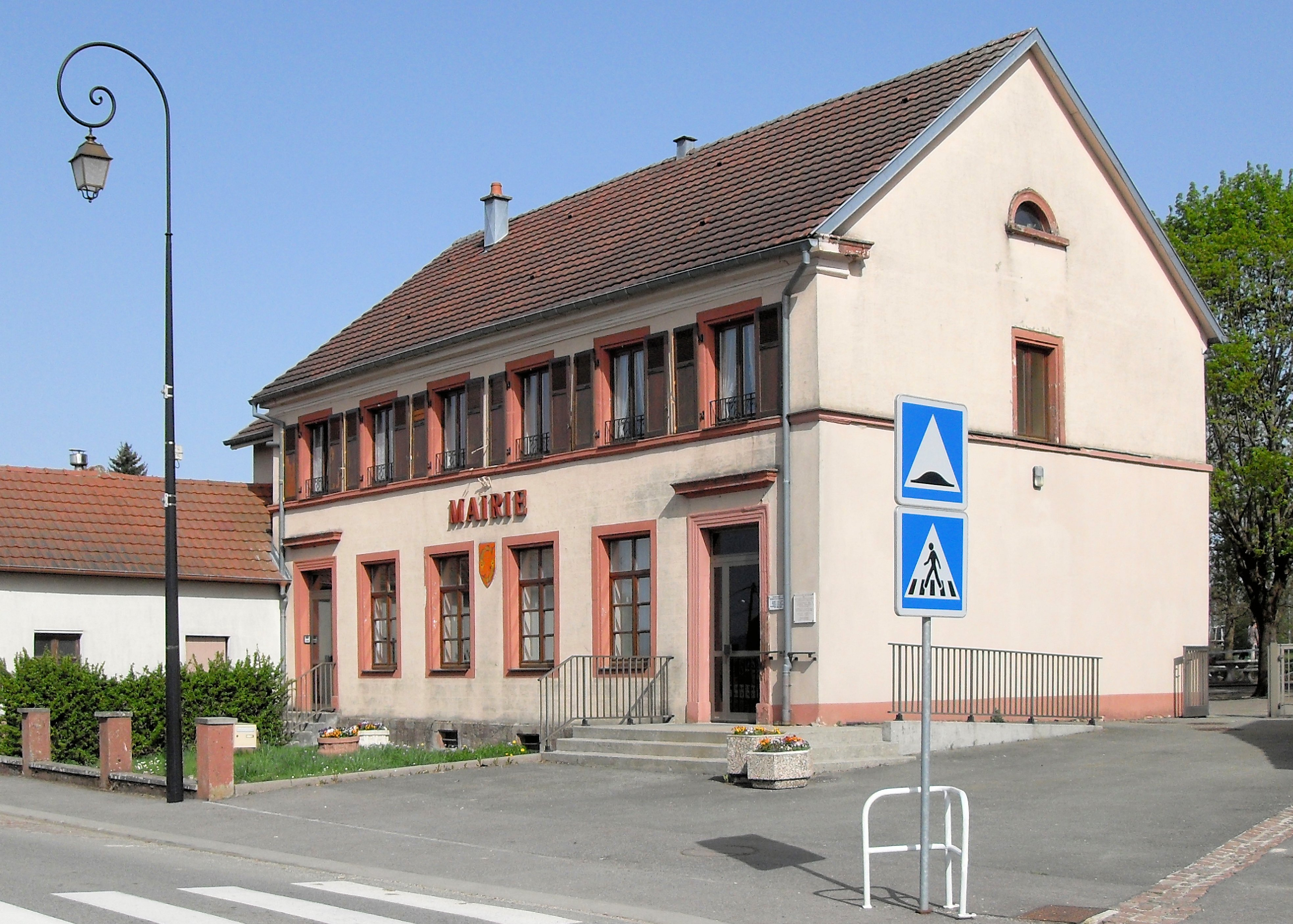 La mairie de Chavannes-sur-l'Étang